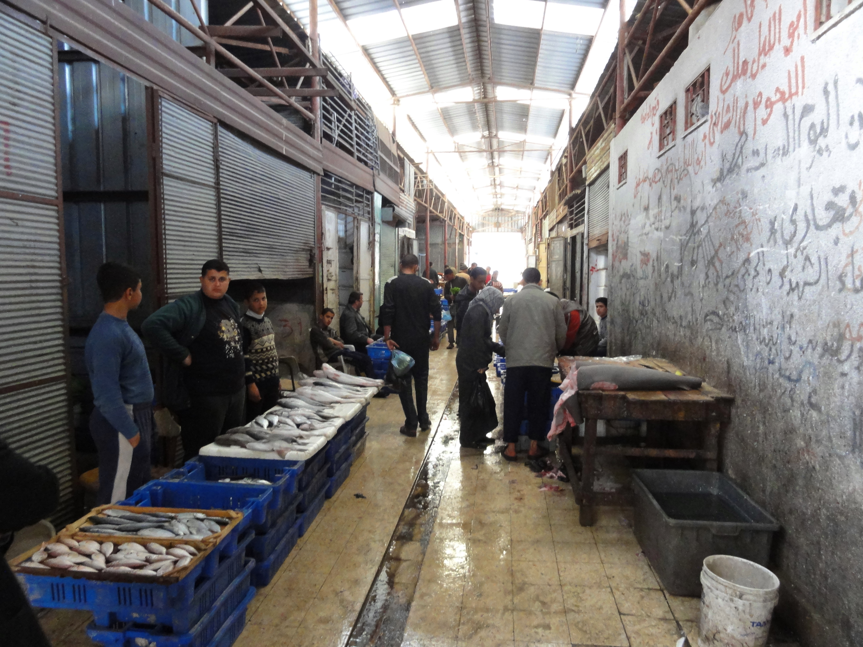 Shati fish market